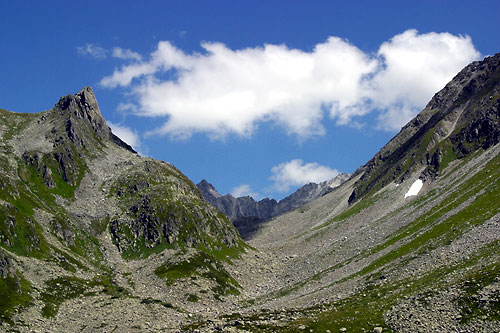 Der Chrüzlipass